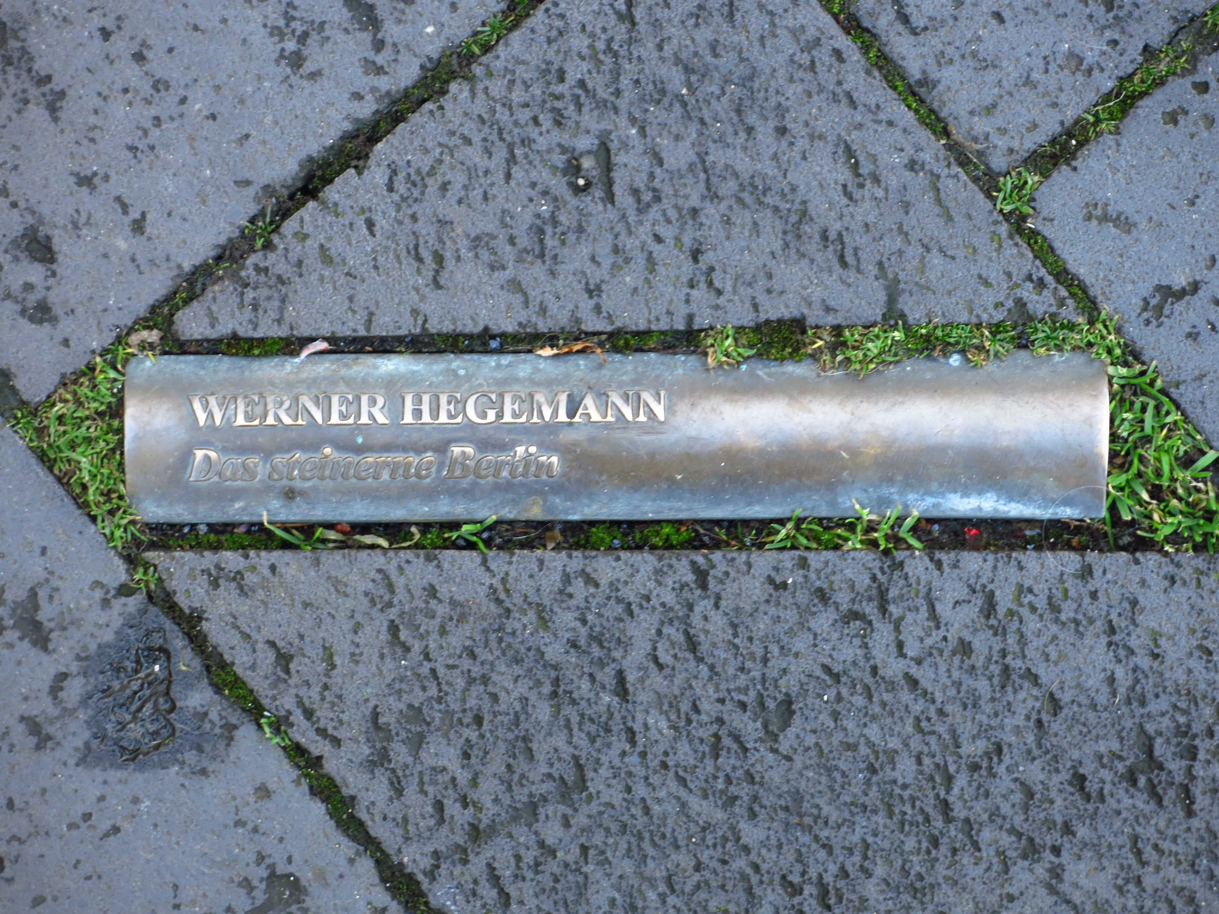 Das Mahnmal zur Bücherverbrennung auf dem Bonner Markt; In das Pflaster des Bonner Markt sind insgesamt 60 sichtbare Buchrücken, sogenannte „Lesezeichen“, verteilt, die sich an der Rathaustreppe, dem Ort an dem die Bücher am 10. Mai 1933 verbrannt wurden, verdichten. Zusätzlich wurde ein wetterfester Archiv-Behälter in Form einer Büchertruhe in den Platz eingelassen. Seine Inschrift benennt das Ereignis und weitere Autoren von verbrannten Büchern.